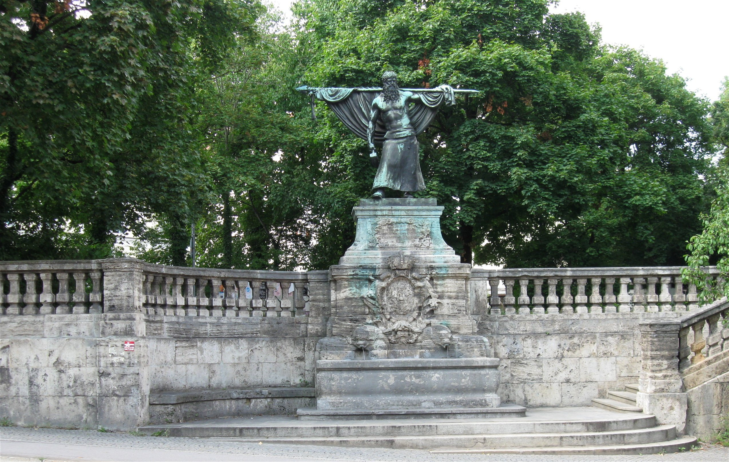 Schmied-von-Kochel-Denkmal in München-Sendling, Lindwurmstraße; Brunnendenkmal mit Standbild auf Postament, eingebettet in eine Futtermauer mit oberer Terrasse und seitlicher Freitreppe; 1906–1911 von Architekt Carl Sattler und Bildhauer Carl Ebbinghaus